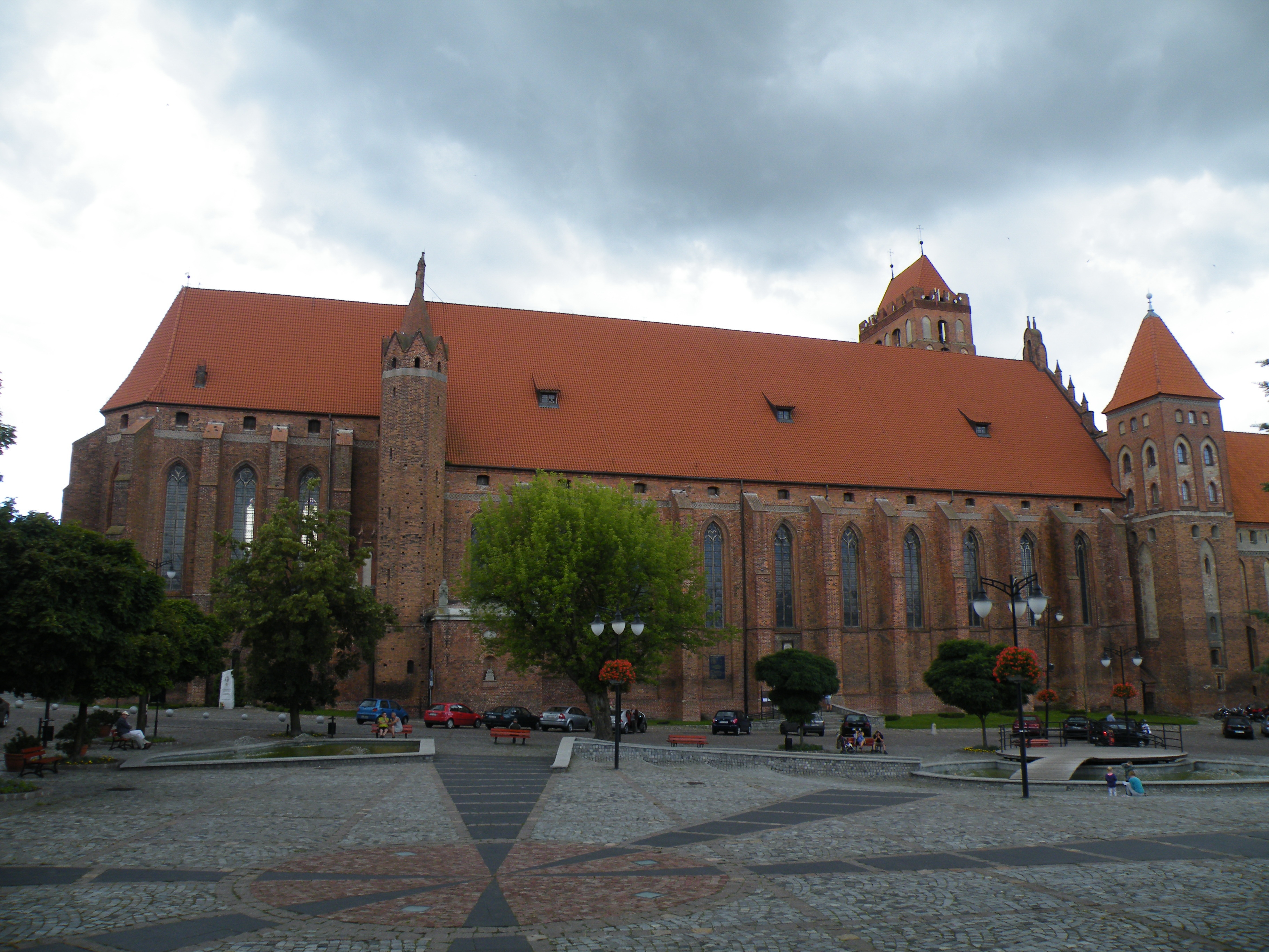 Kwidzyn, katedra, ob. kościół p.w. św. Jana Ewangelisty, 1264, 1344-1355, XIX